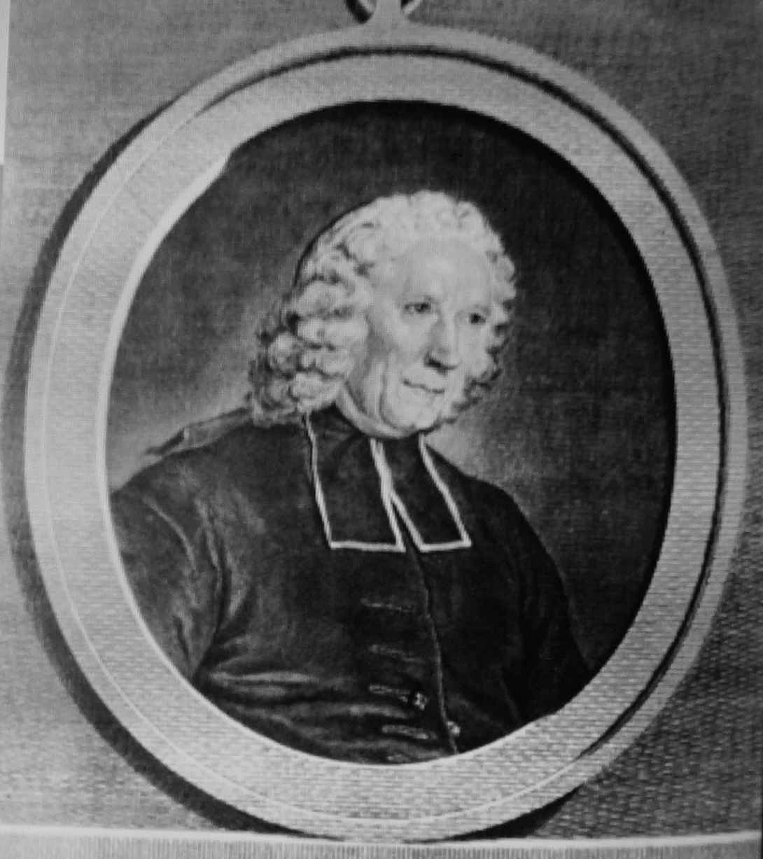 une image de l'abbé pluche